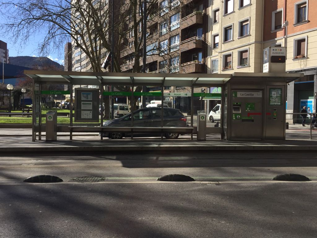 Estación de la Casilla del tranvía de Bilbao